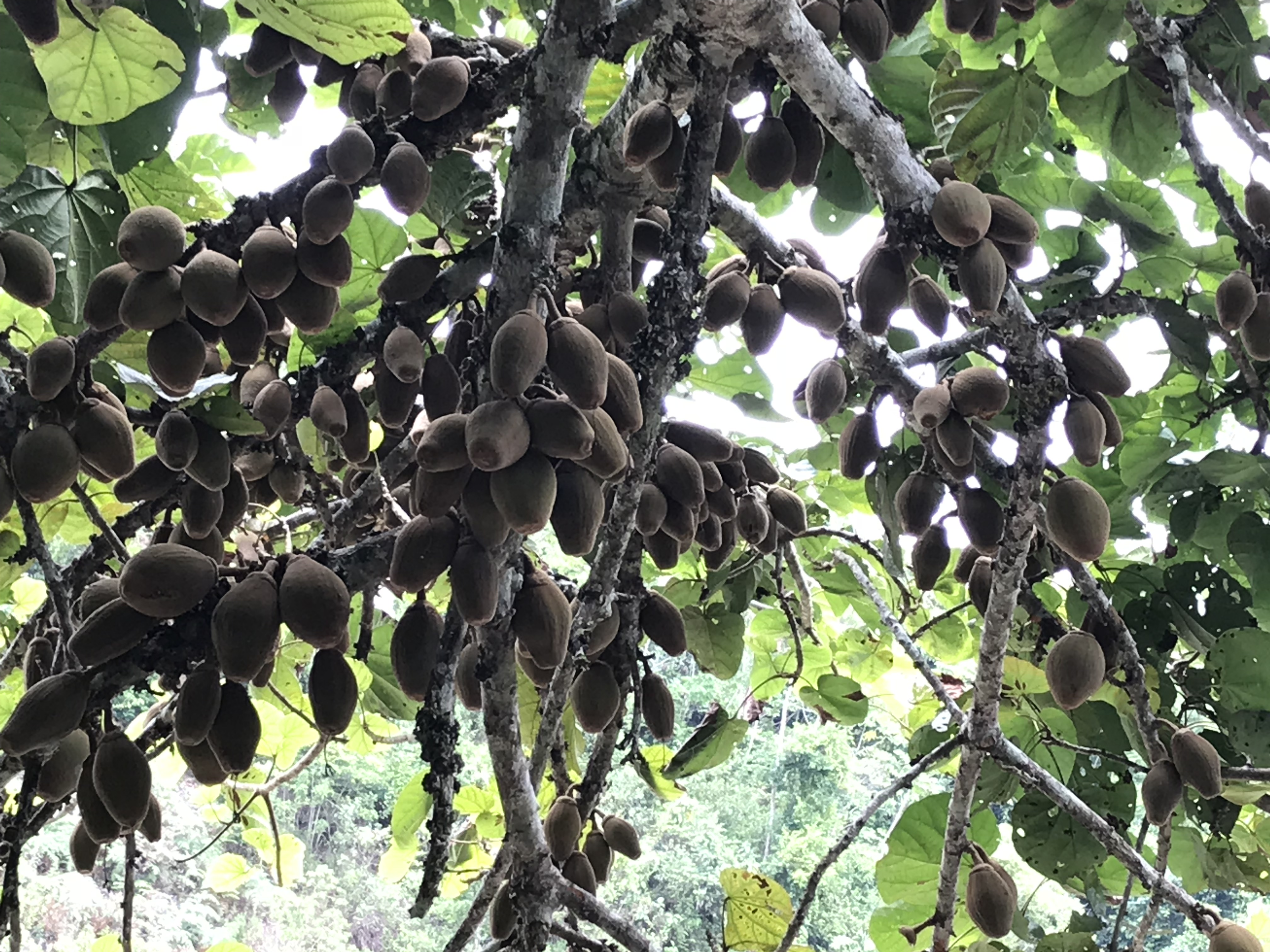 Mamey asilvestrado en la Amazonía peruana, en plena fructificación.